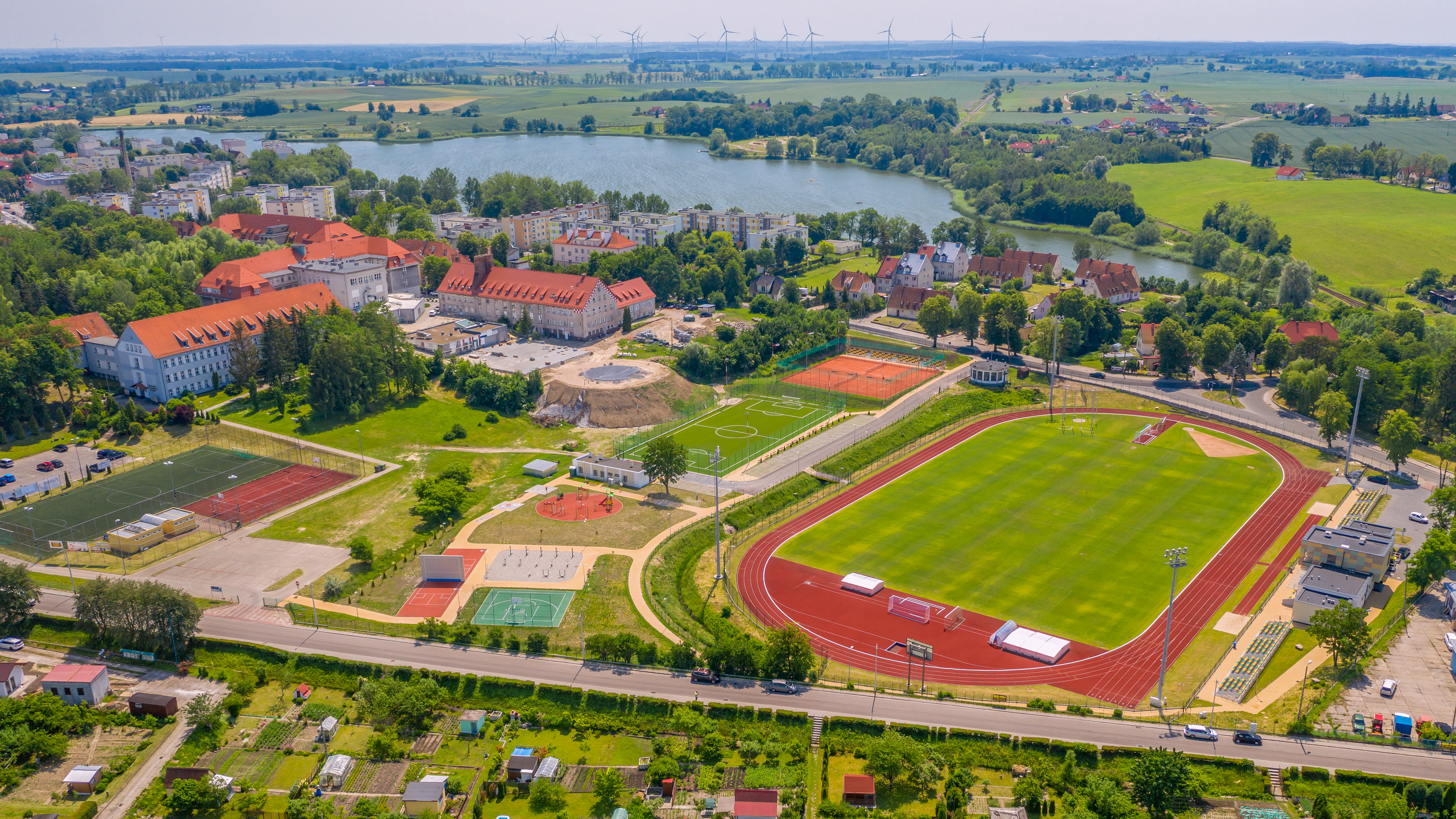 Stadion w Sztumie